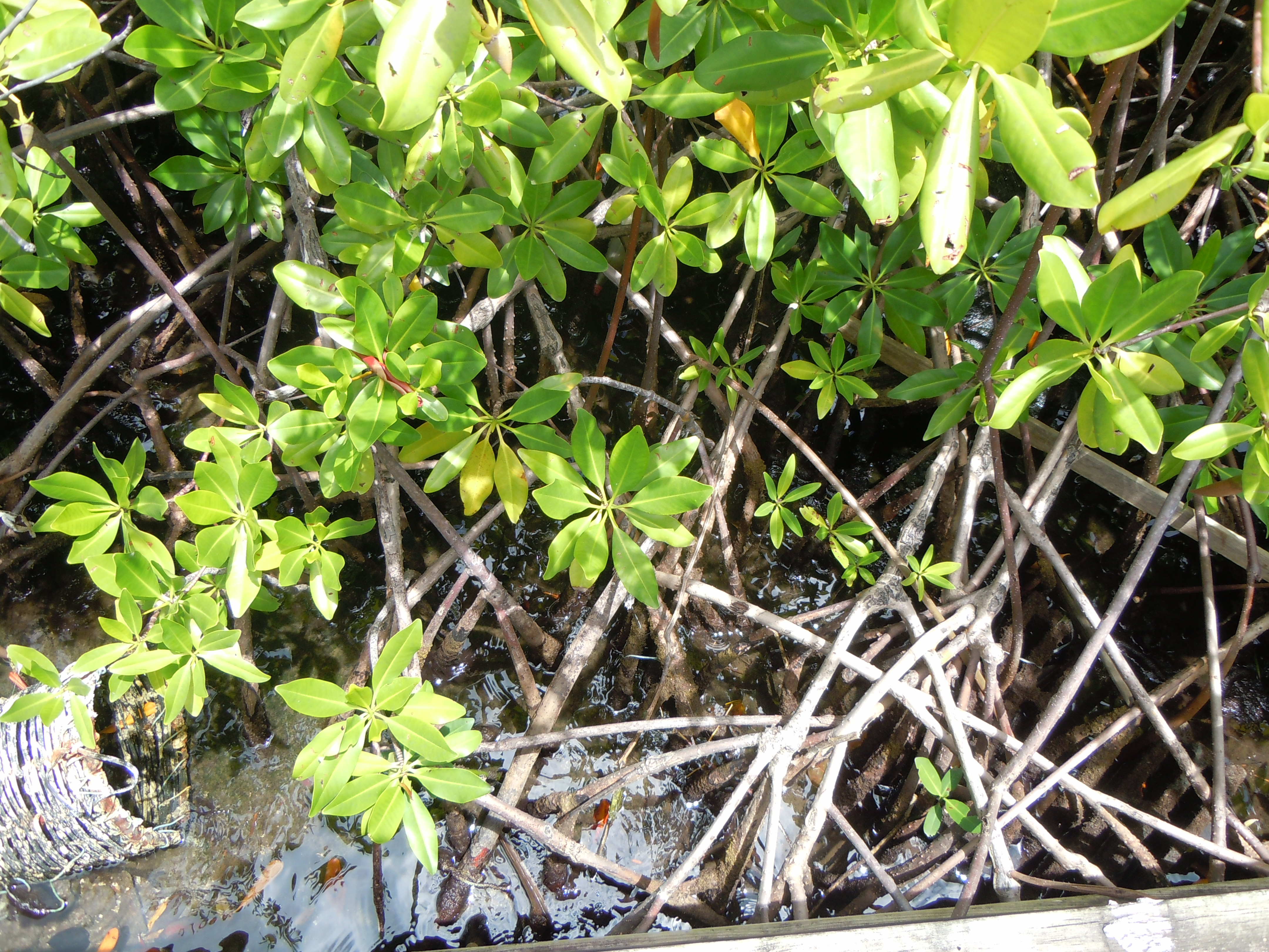 Racines et feuilles de Rhizophora mangle - Petit Îlet Duprey - le Marin - Martinique